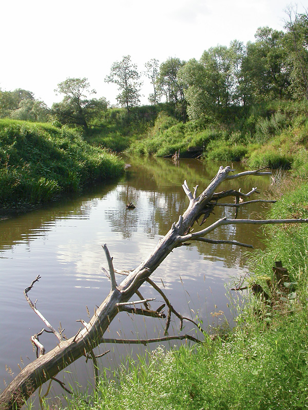 Lama river, Moscow region, Russia (near Yaropolets), 2003